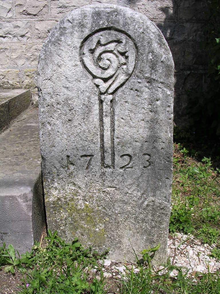 Photographie d'une borne domaniale cistercienne prise sur les lieux des vestiges de l'abbaye de moniales à Tart Côte-d'Or